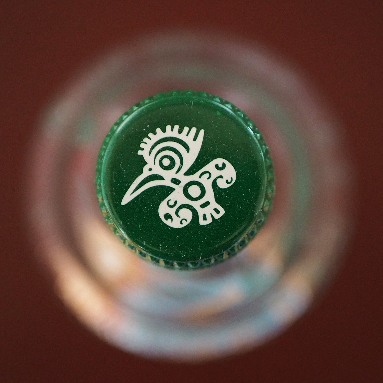 Schraubverschluss einer Flasche Mio Mio Mate – Banane, gekauft Anfang 2020.